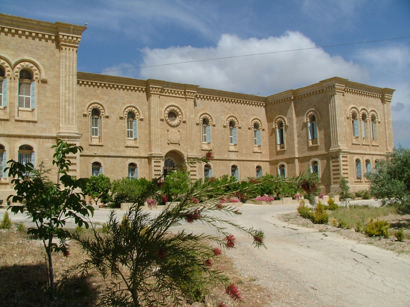 La residenza di Betlemme dei Preti del Sacro Cuore di Gesù di Bétharram, fondata da Augusto Etchécopar, ed inaugurata nel 1885. Foto personale.